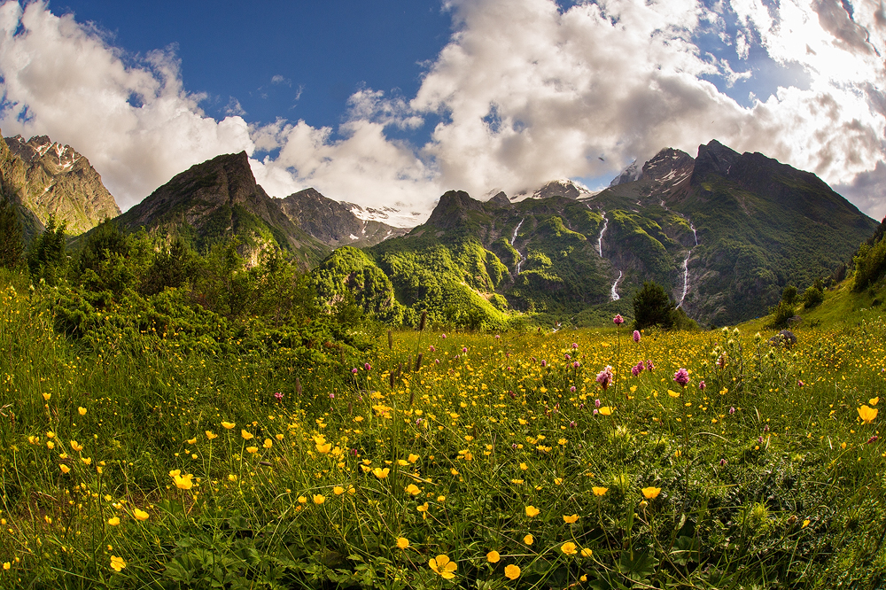 Национальный парк Алания, Ирафский район This image is related to the protected area of Russia number 1500198